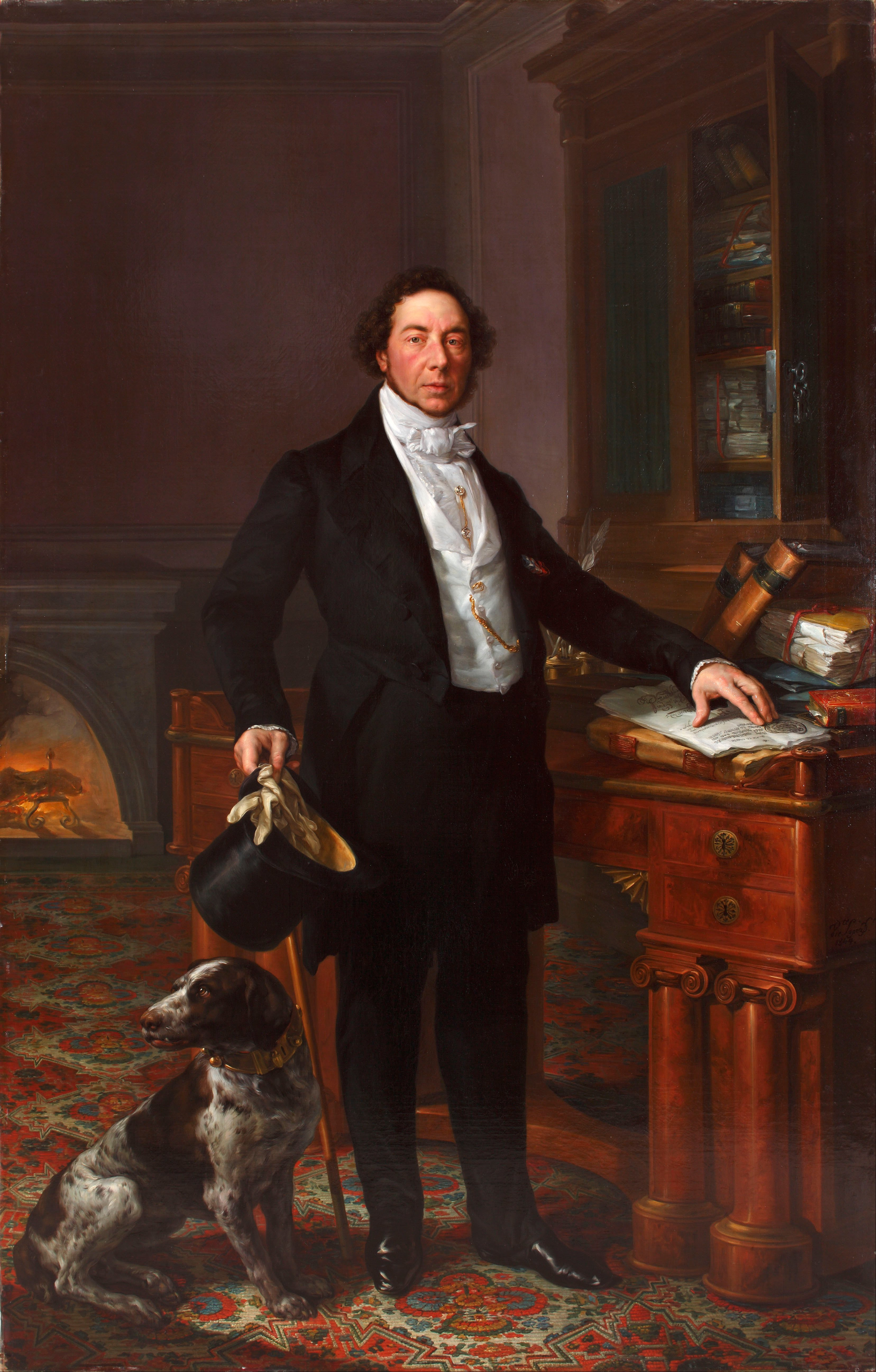 Retrato de Gaspar de Remisa Miarons (1784-1847), que fue marqués de Remisa y vizconde de Casa Sans y tambieén un financiero y aristócrata español oriundo de Cataluña.